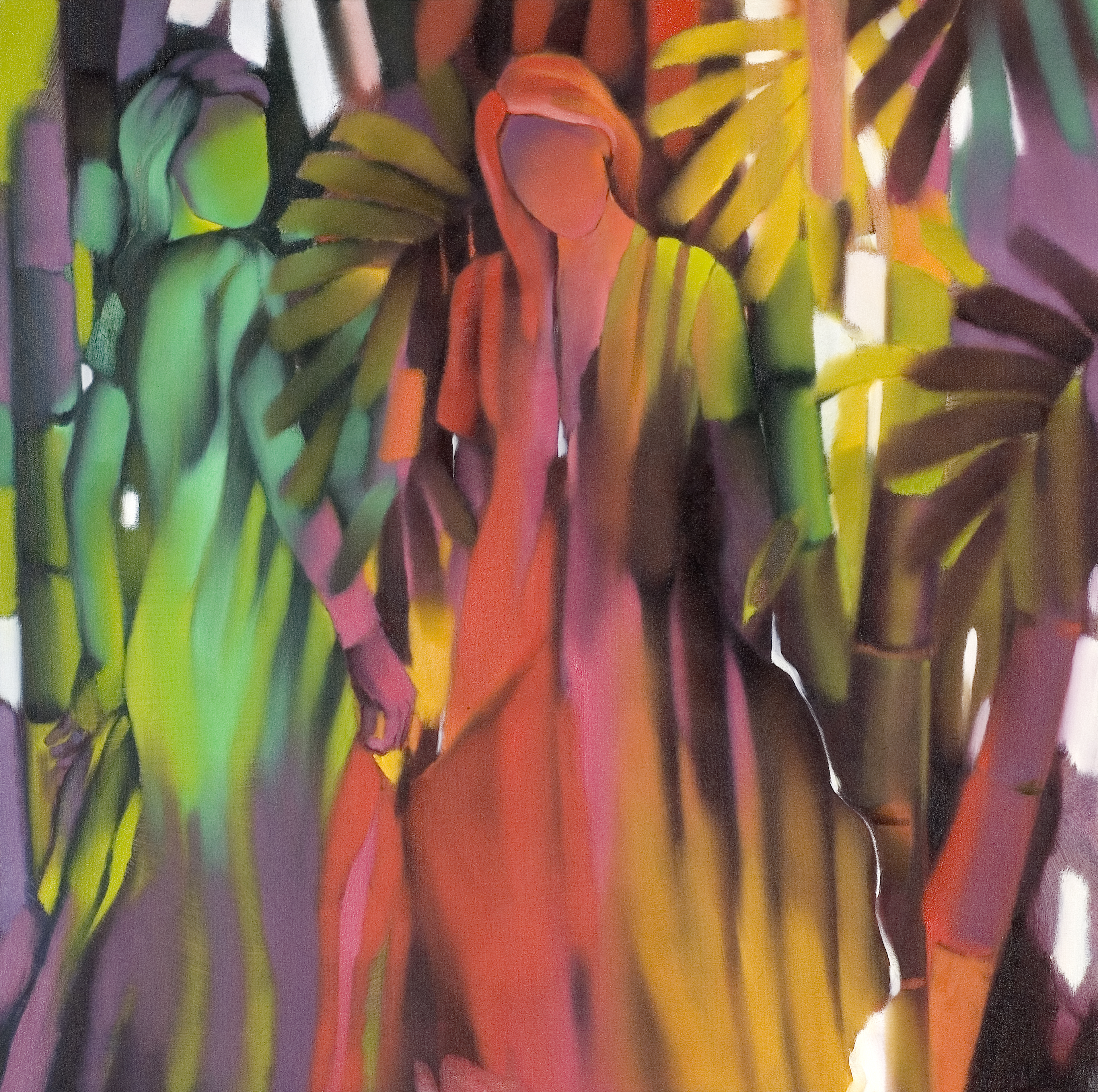 Amaya Salazar